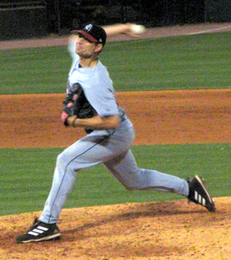 John Wasdin, pitcher